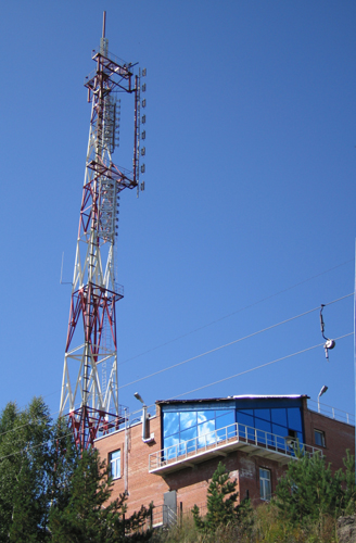 Первый в России негосударственный трансляционно-передающий центр